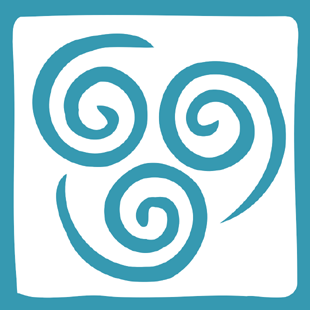 Emblema de los nomadas del aire de Avatar